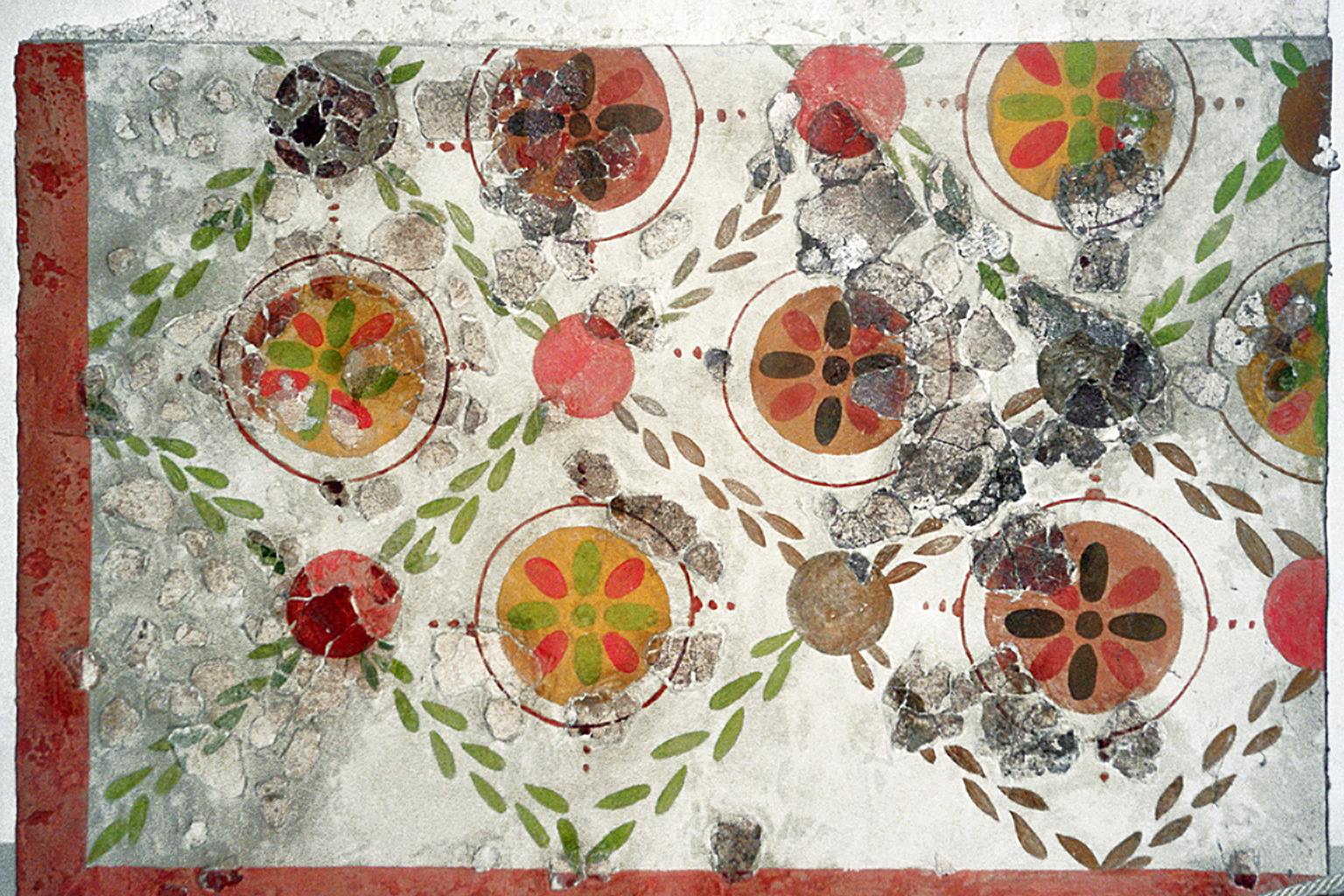 Visegrád-Várkert (Ungarn): Wandmalerei aus der von Sándor Soproni 1955 untersuchten Villa Rustica. Aufgenommen während der provinzialrömischen Sonderausstellung „Visegrád évszázadai – A római kor kezdete a Dunakanyarban“ die vom 19.08.2011 bis 20.07.2012 im Mátyás Király Múzeum (König-Matthias-Museum), Visegrád, stattfand.